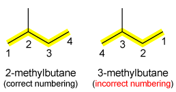 IUPAC naming (alkane)